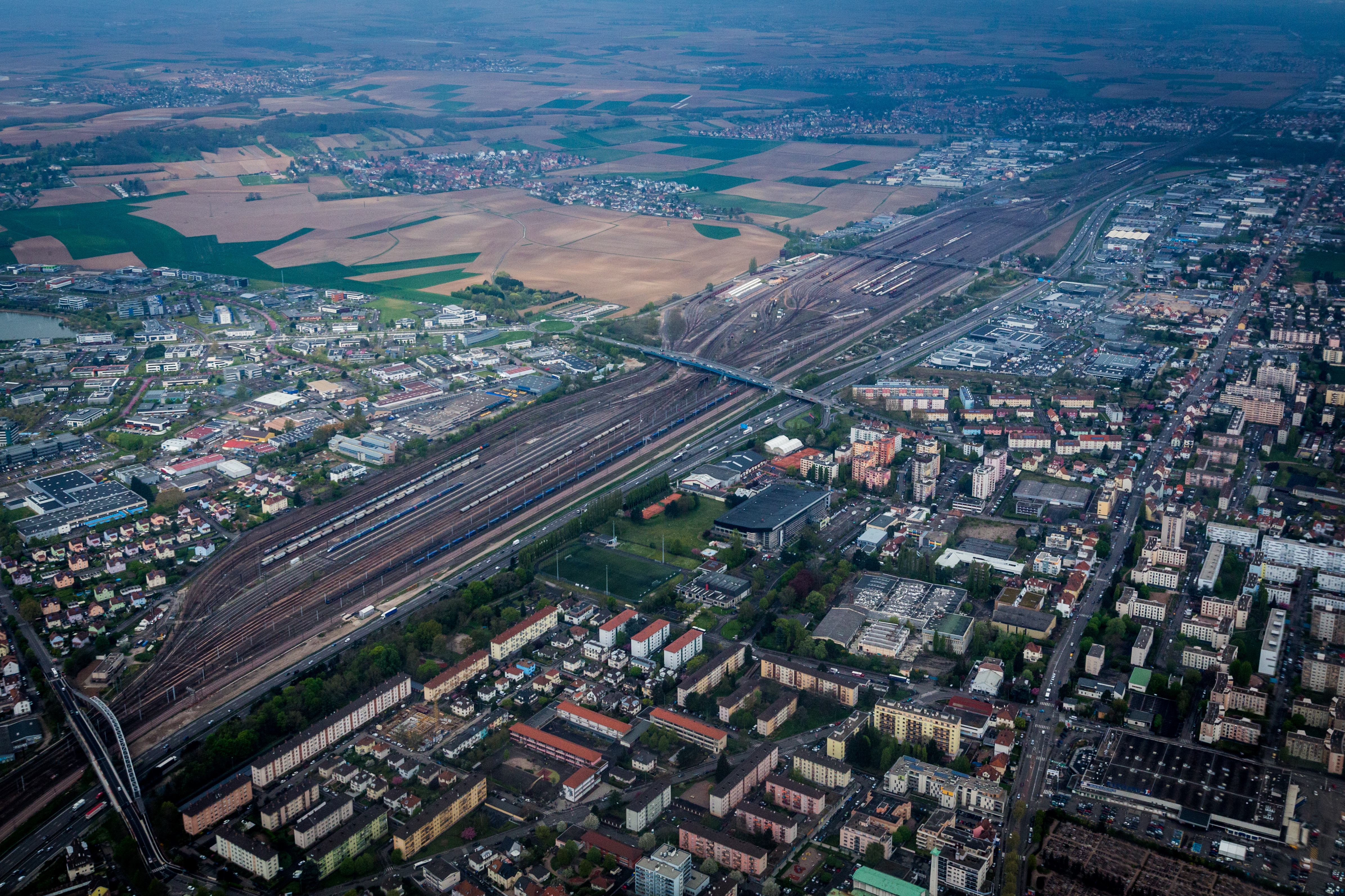 Triage SNCF de Hausbergen avril 2015